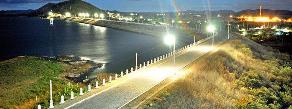 Pista de Caminhada da Parede do Açude